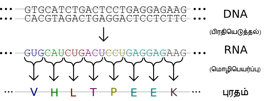 மரபணு வெளிப்பாடு எளிய வரைபடம்